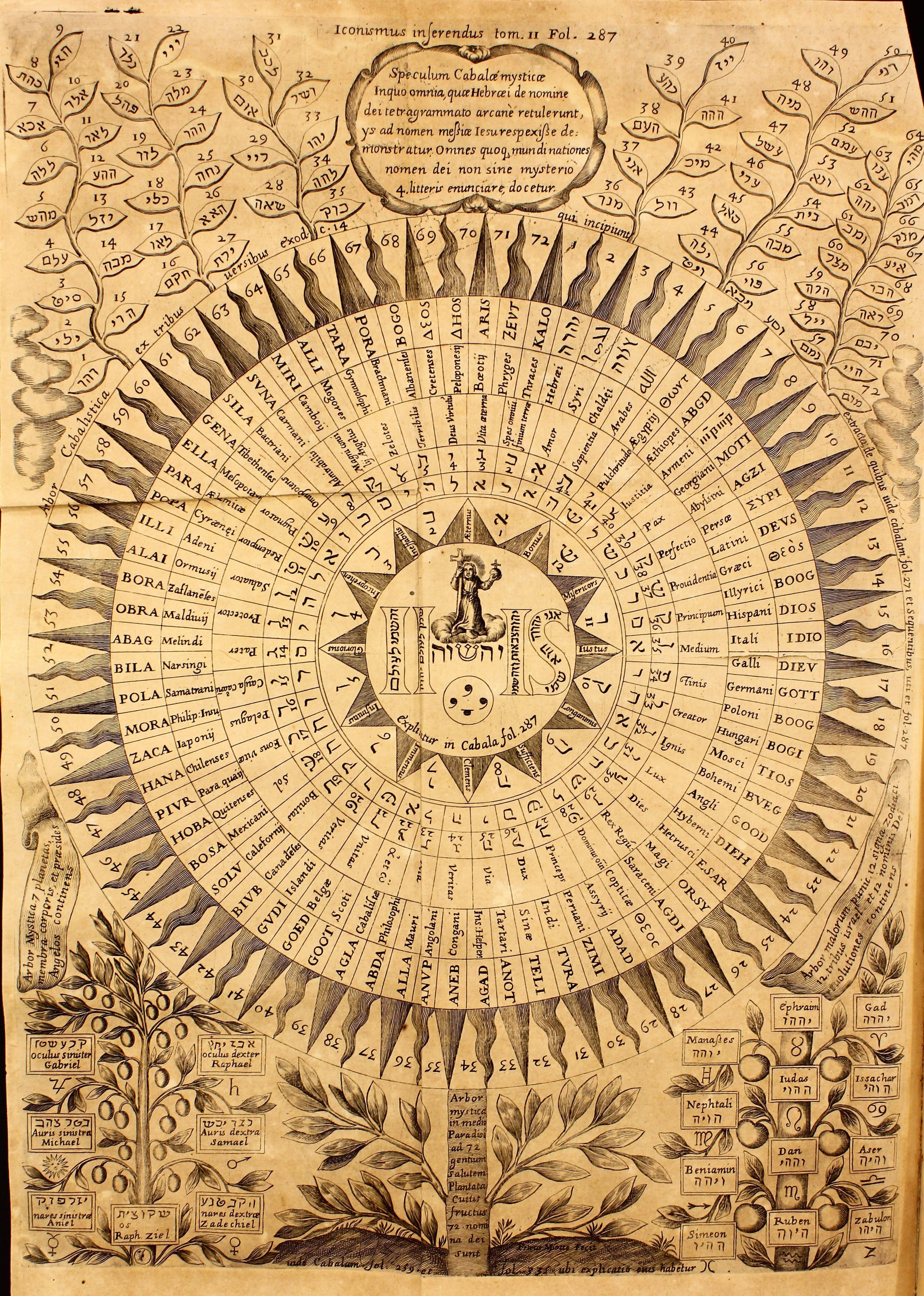 Autor: Kircher, Athanasius, (S.I.), 1602-1680 Descripción bibliográfica: Athanasii Kircheri, Soc. Iesu, Oedipi Aegyptiaci Tomus Secundus : gymnasium sive phrontisterion hieroglyphicum in duodecim classes distributum, in quibus Encyclopaedia Aegyptiorum, id est, Veterum Hebraeorum, haldaeorum ... demonstrata ... : pars prima, complectens sex priores classes . - Romae : Ex Typographia Vitalis Mascardi,1653. - [2], 440, [30] p. : il. ; Fol. Materia: Egipto - Escritura jeroglífica Notas: La segunda fecha consta en el colofón. - Sign.: A-3M4, 3N3 . - Il. xil. Impresor: Mascardi, Vitale Lugar de impresión: Italia. Roma Localización: Vea la ilustración en su contexto Libro completo en pdf